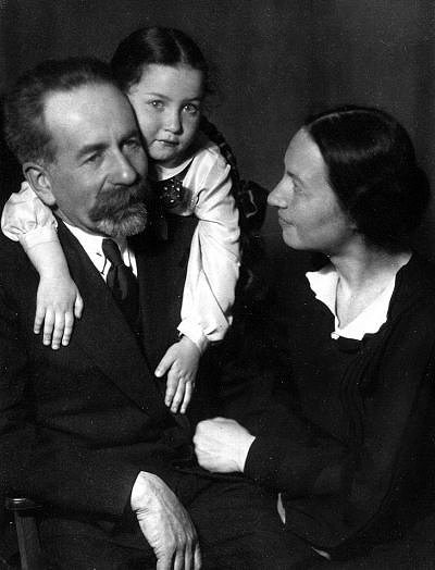 Семья геолога Вениамина Аркадьевича Зильберминца (1887—1939)